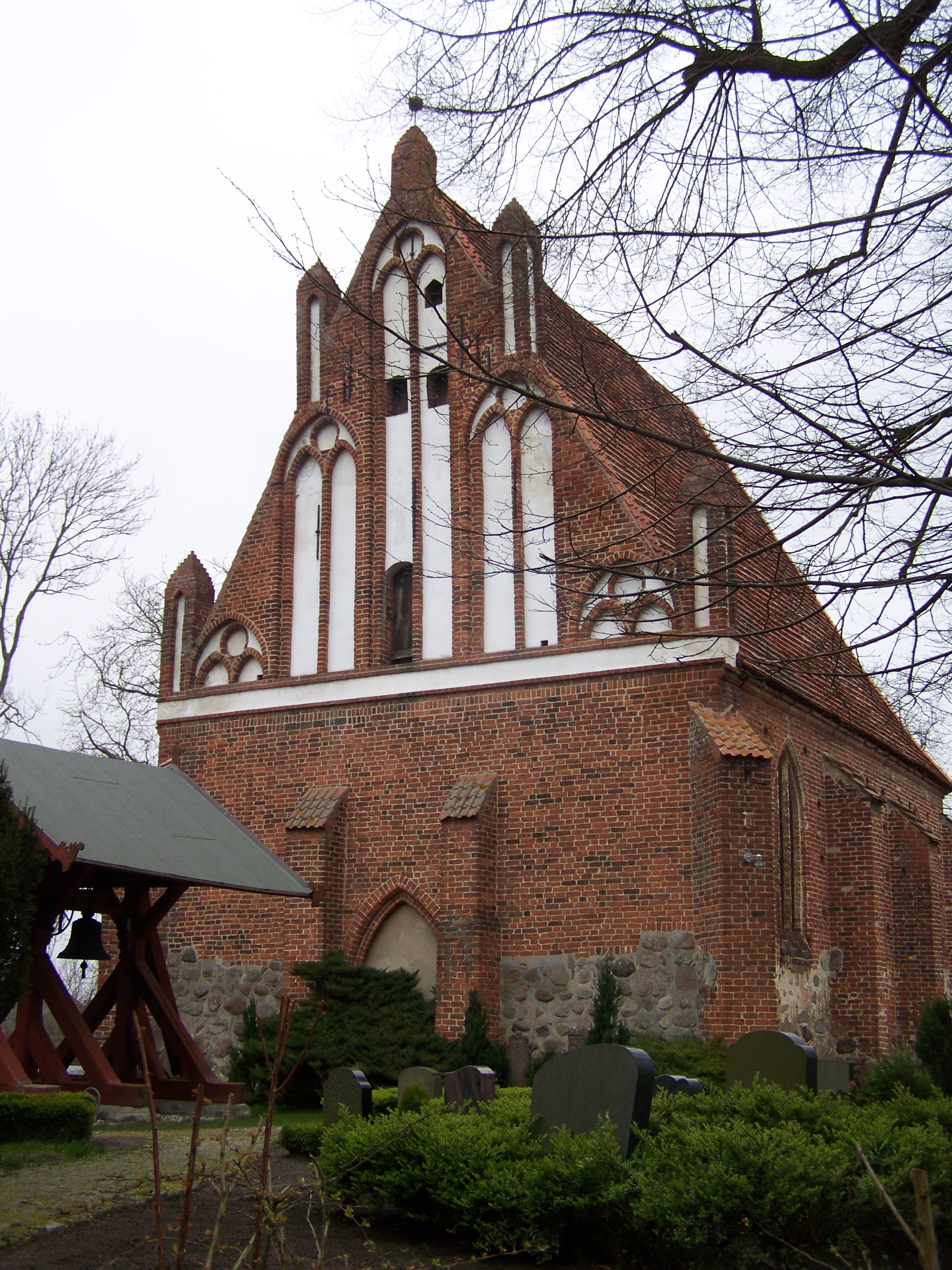 Dorfkirche_Velgast,_Frontansicht und Glockenstuhl